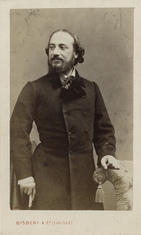 Adolphe Eugène Disderi (1819-1889) – Il tenore italiano Giovanni Matteo De Candia (1810-1883).